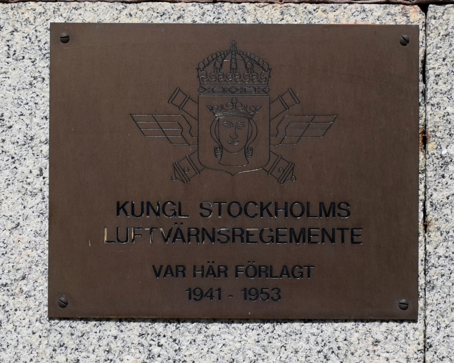 Minnestavla över Stockholms luftvärnsregemente tid på Linnégatan 89 i Stockholm, där de var förlagda åren 1941–1953.